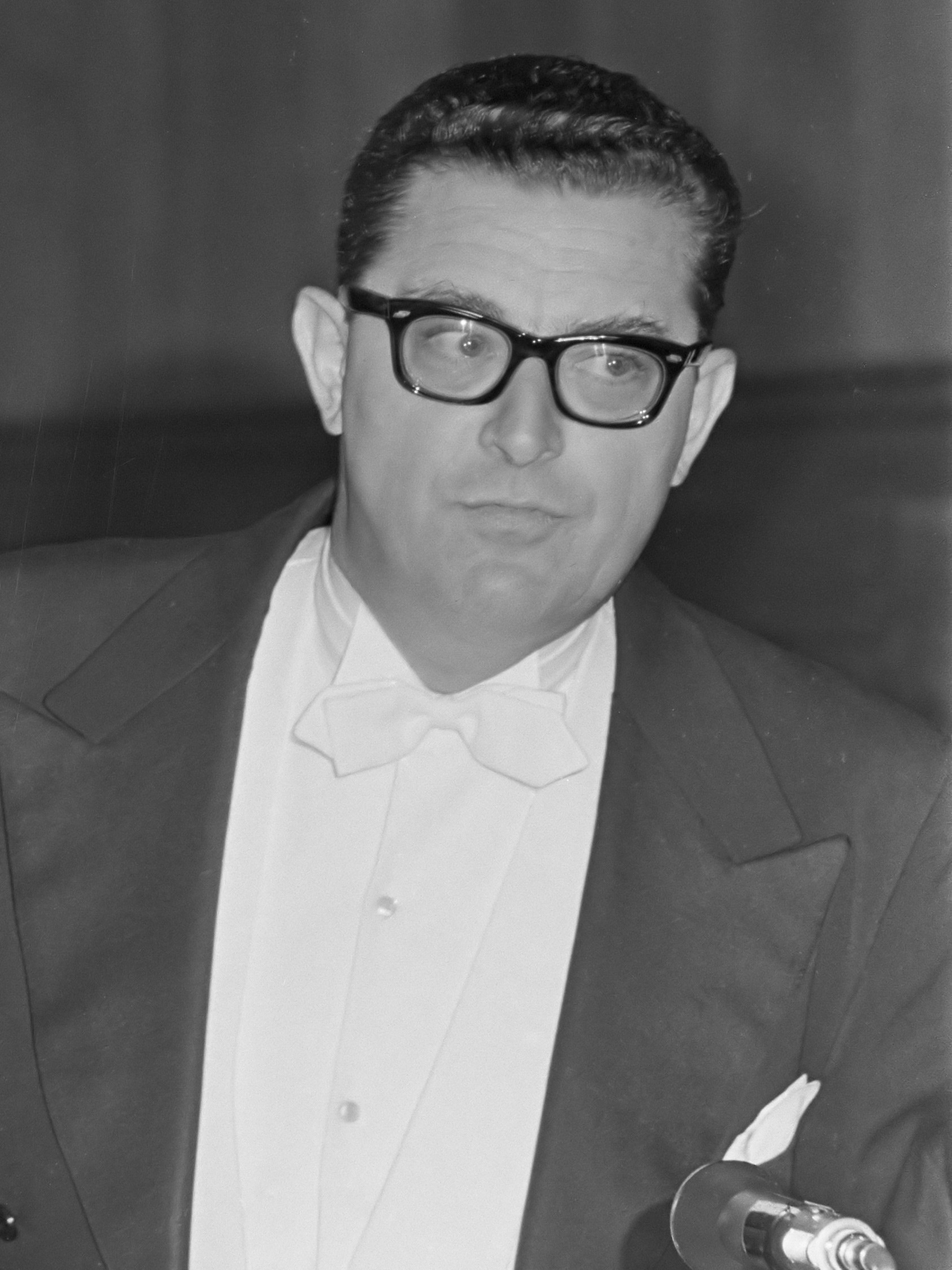 De burgemeester van Sleen, drs. G.W.B. Borrie, tijdens de verdediging van zijn dissertatie in Amsterdam; de promovendus, drs. G.W.B. Borrie, luistert geconcentreerd